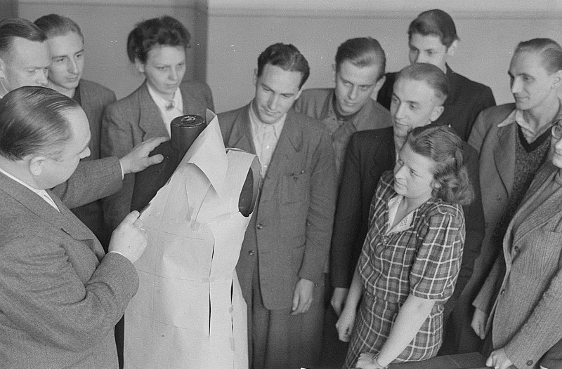 Original image description from the Deutsche FotothekUnterricht in der Kürschnerschule